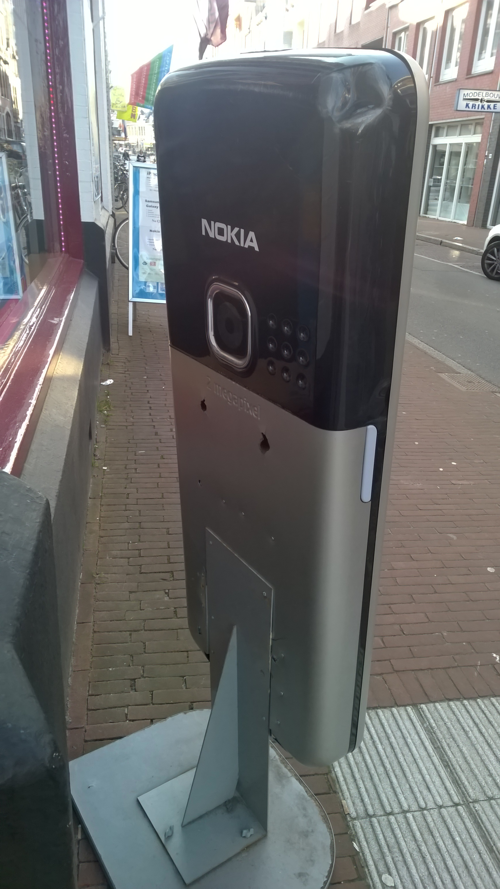 Een decoratieve Nokia 6300 buiten een telefoonwinkel in Groningen Stad.